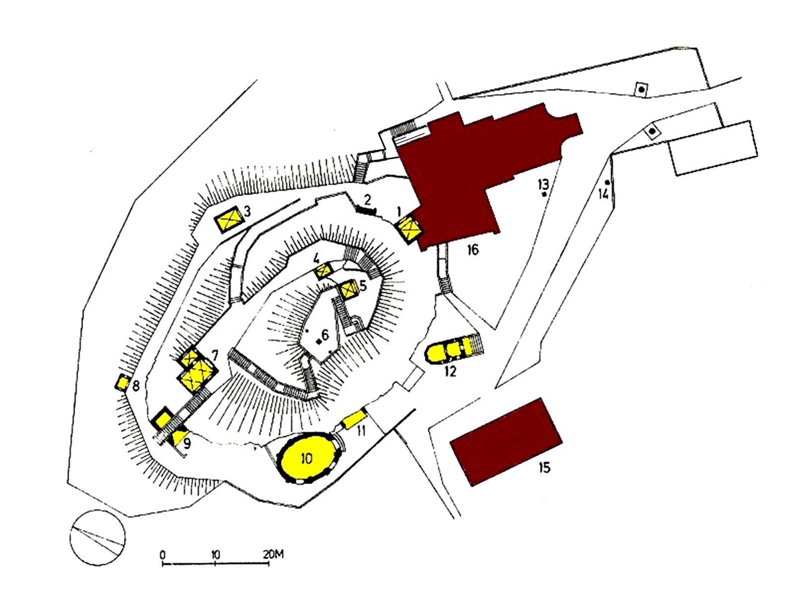 Lageplan des Grazer Kalvarienberges mit Kapellen, Bildstöcken, Kalvarienbergkirche und Pfarrhof